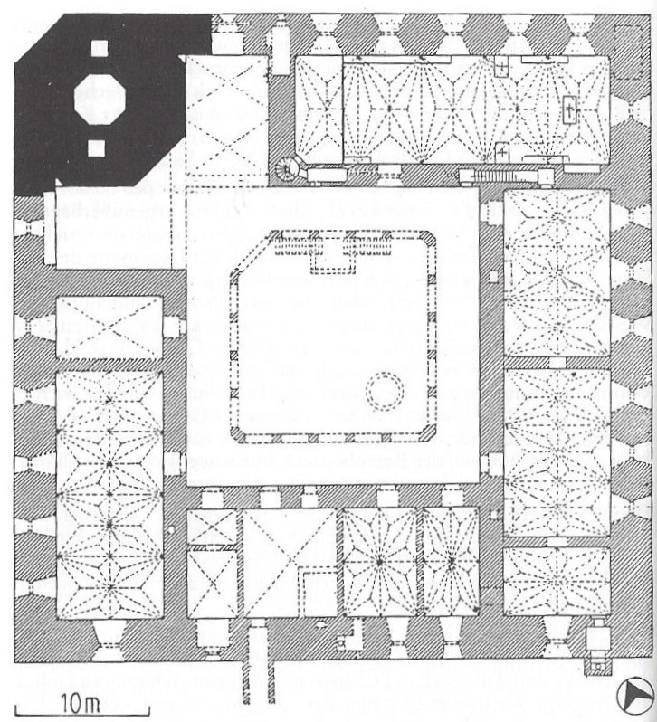 Grundriss der 1811 abgetragenen Burg Schlochau